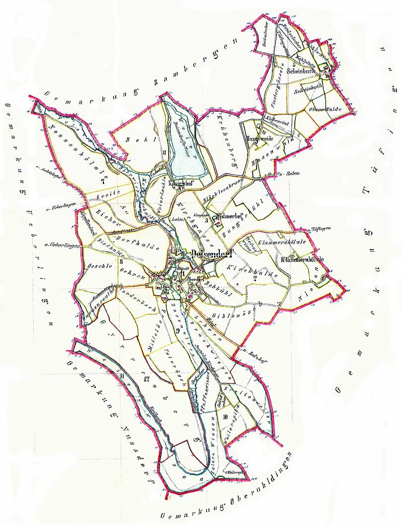 Historische Gemarkungskarte der Gemeinde Deisendorf (selbst aus altem Gemarkungsatlas gescannt) Leider keine Angabe, wie alt der Atlas war, vermutlich 19. Jh oder frühes 20. Jh. --Crux 00:57, 29. Dez 2005 (CET)